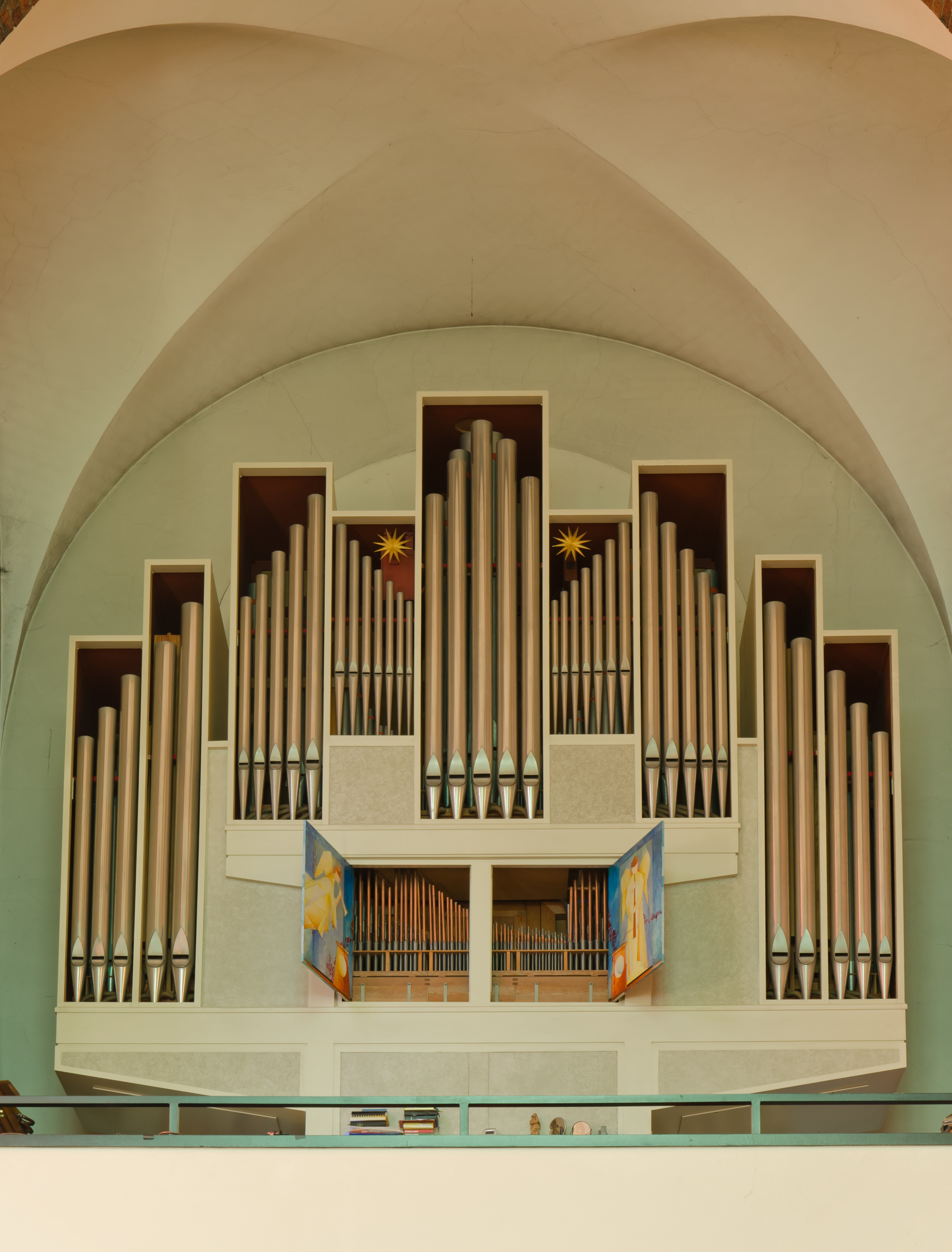 St. Joseph Wandsbek Orgel